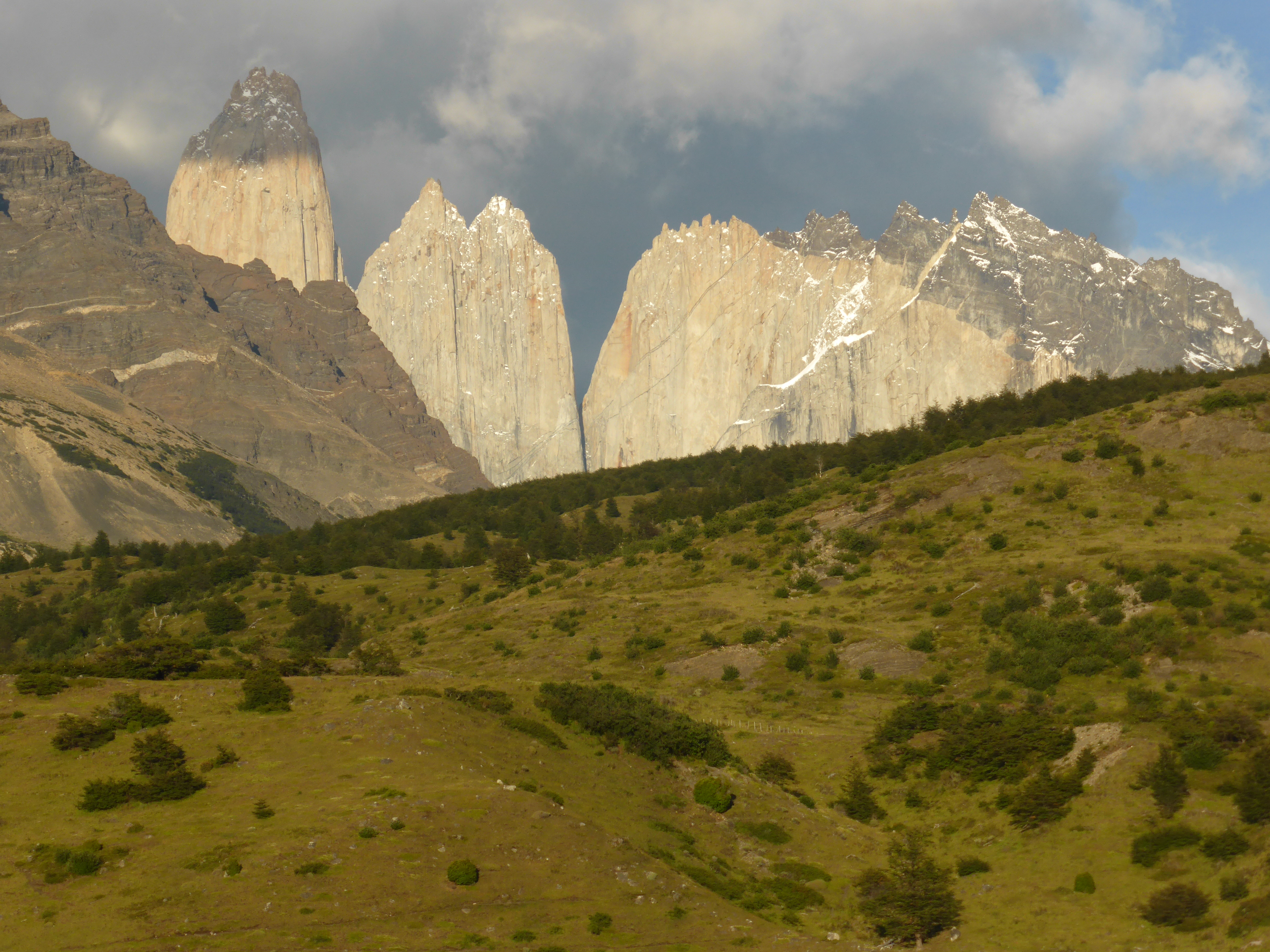 A la izquierda, la Torre Central (2800 msnm), y a su lado la Torre Norte (2600 msnm).